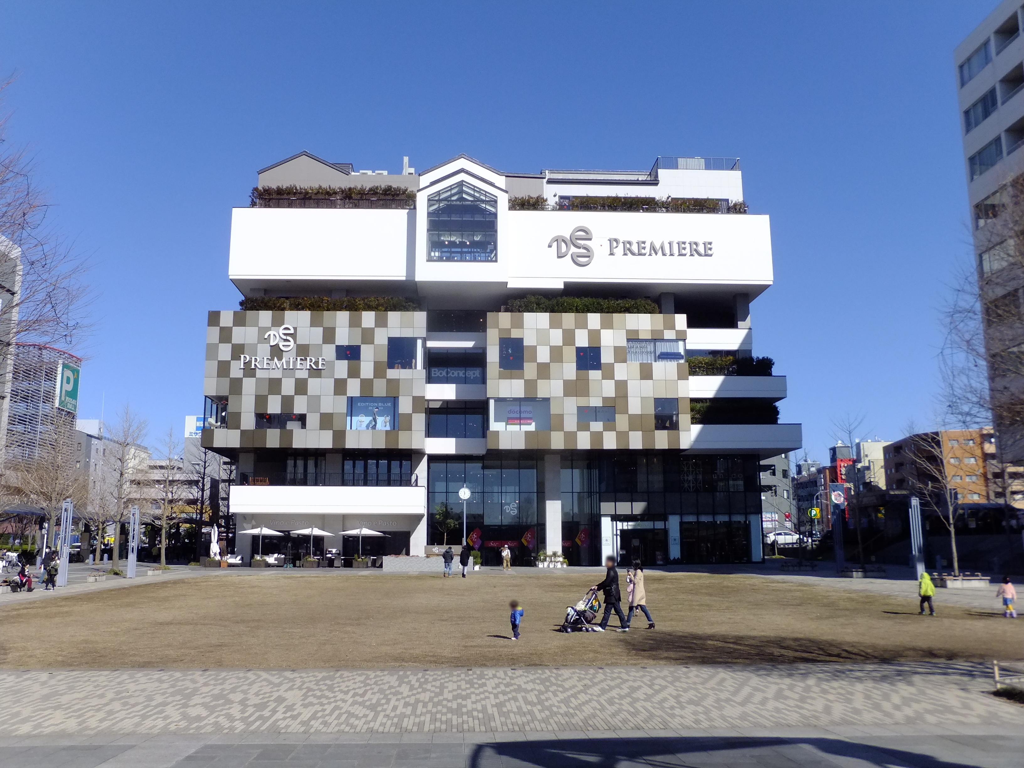 港北ニュータウンのショッピングモール・プレミア ヨコハマ